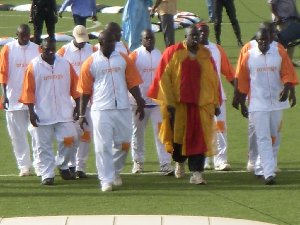 Entrée du champion de lutte sénégalaise Yékini sur le stade Demba Diop de Dakar, Sénégal